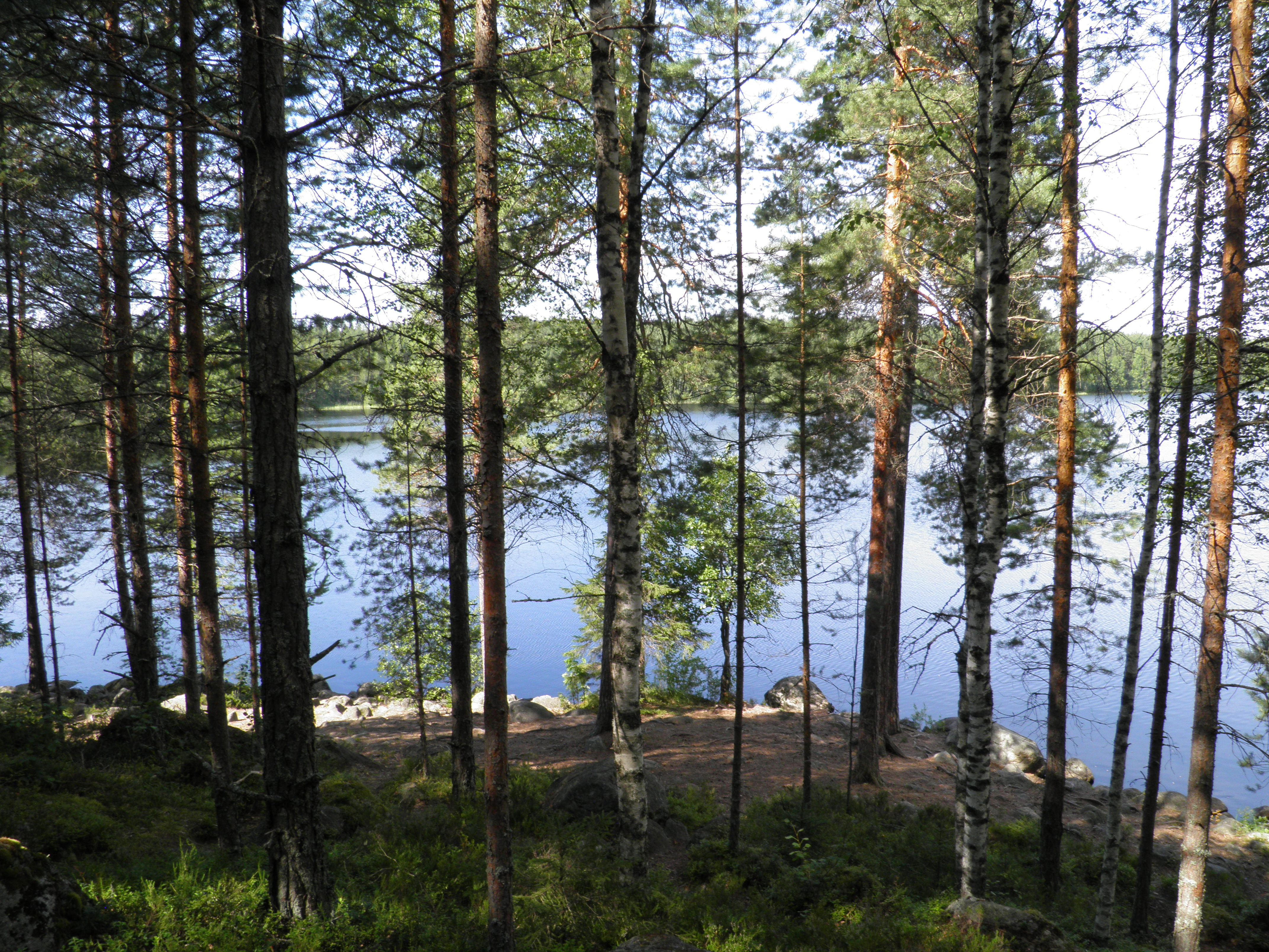 Ylinen Niemisjärvi ja metsää Evolla Hämeenlinnassa.